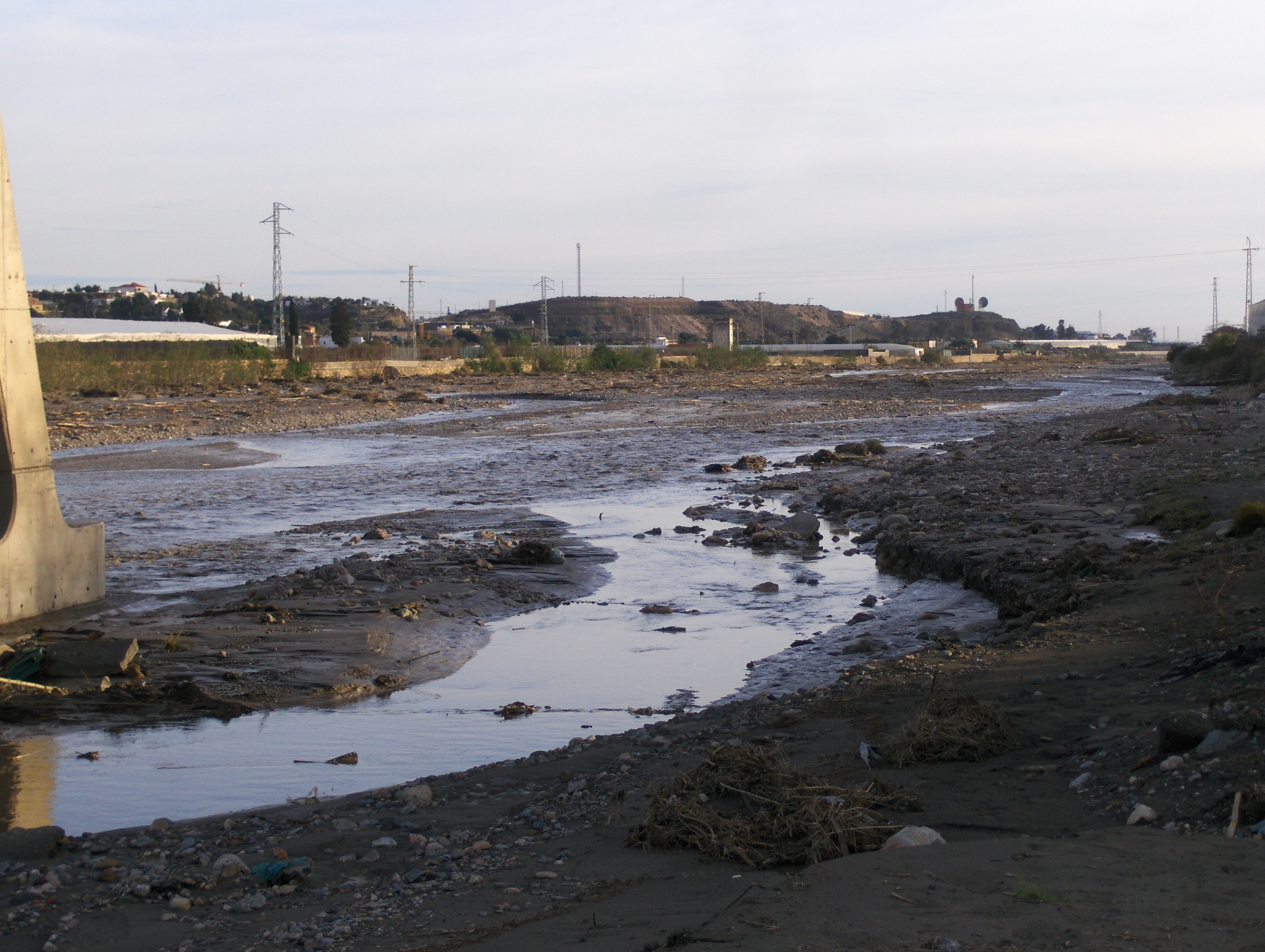 Río Andarax, con agua, en Huércal de Almería